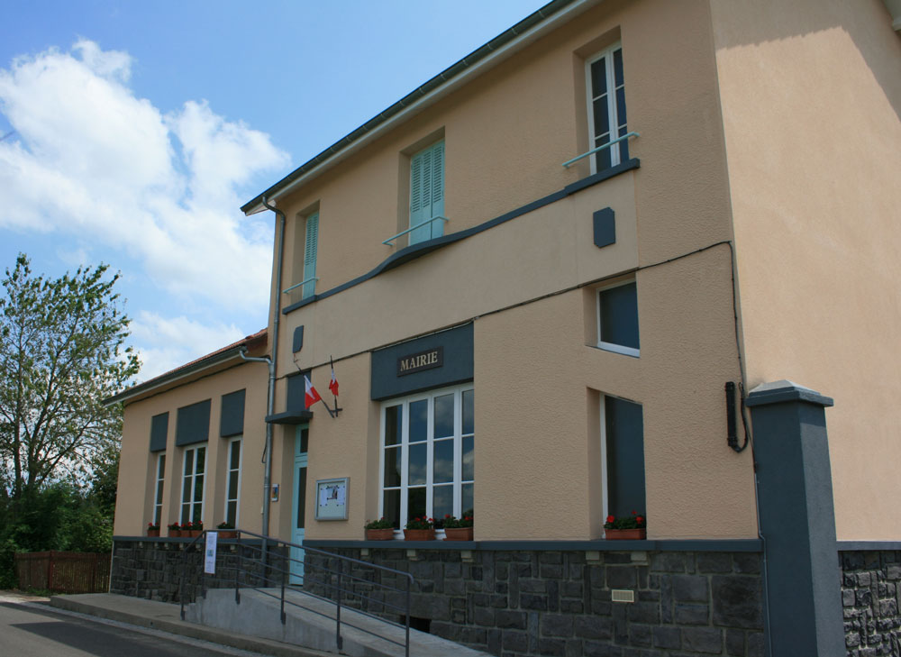 Mairie de Saint Hilaire les Monges